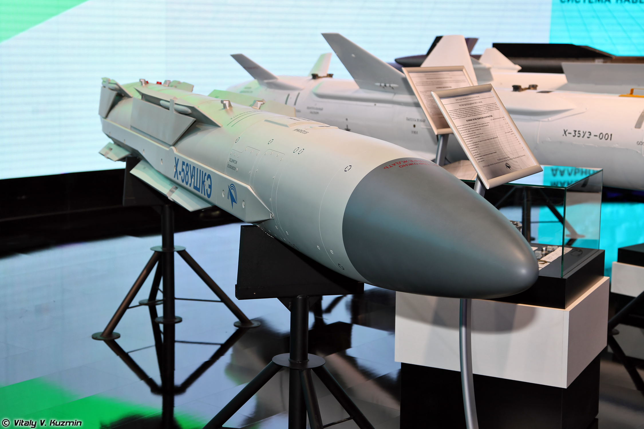 Противорадиолокационная ракета Х-58УШКЭ (Kh-58UShKE anti-radiation missile)